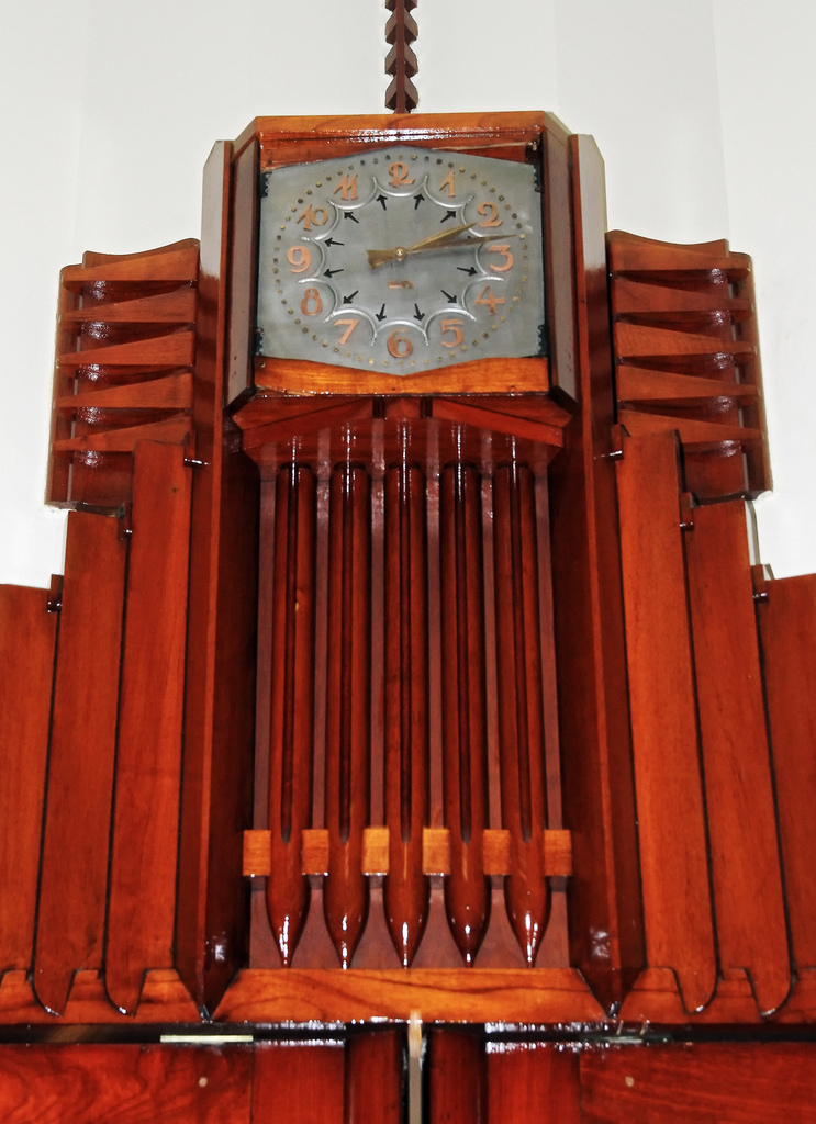 55 scheepvaarthuis klok++